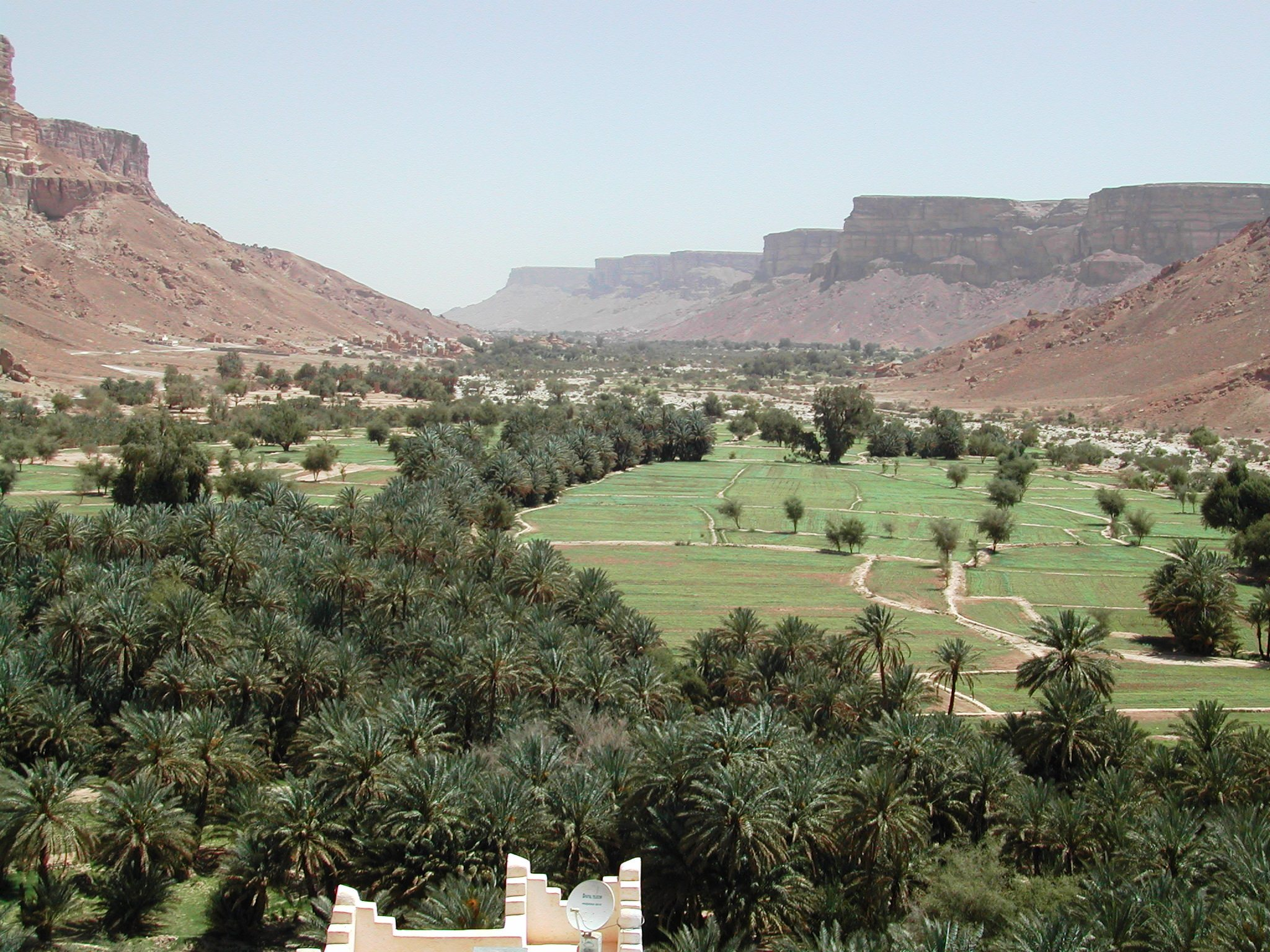 حجل سهوه باعسيل